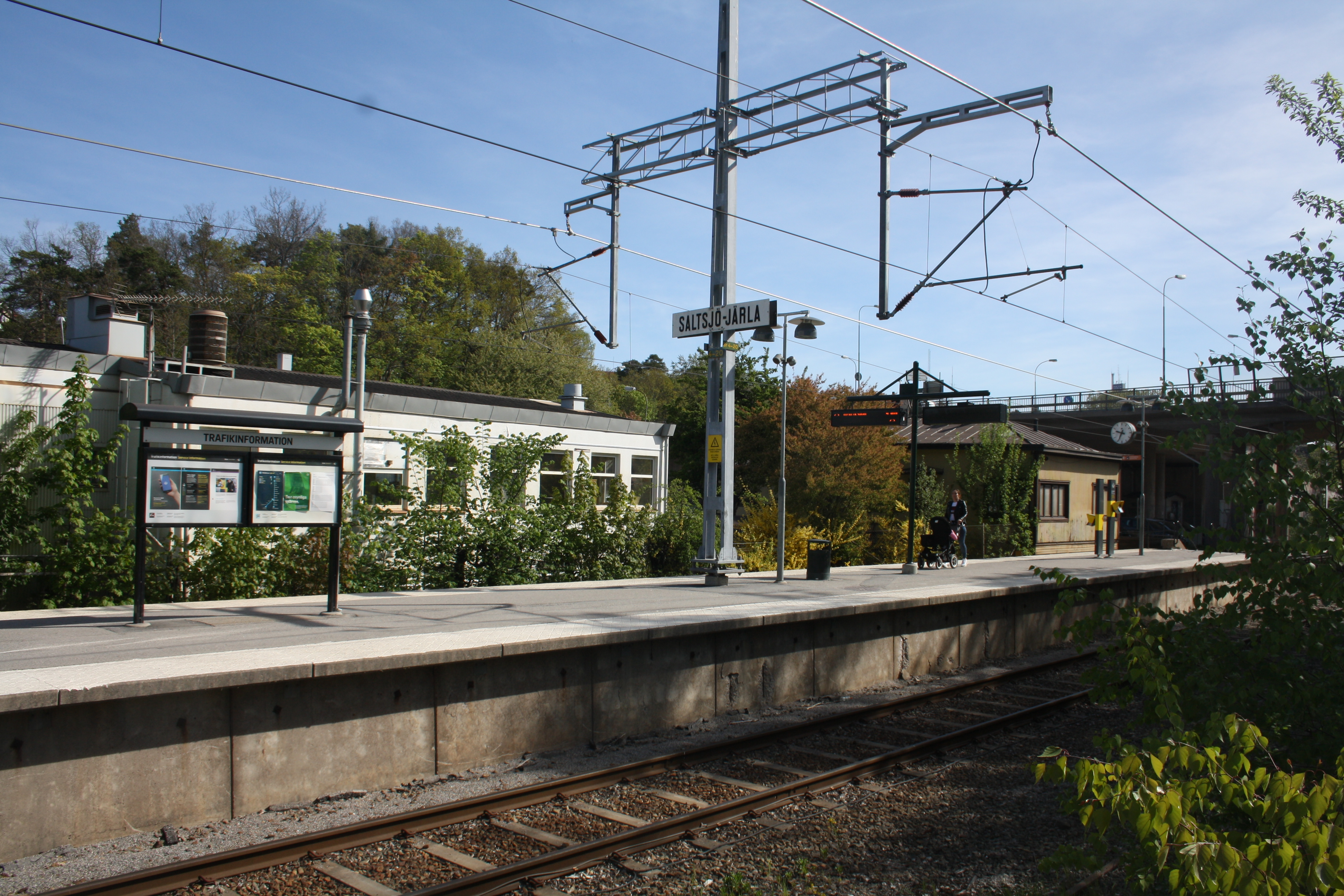 Saltsjö-Järla